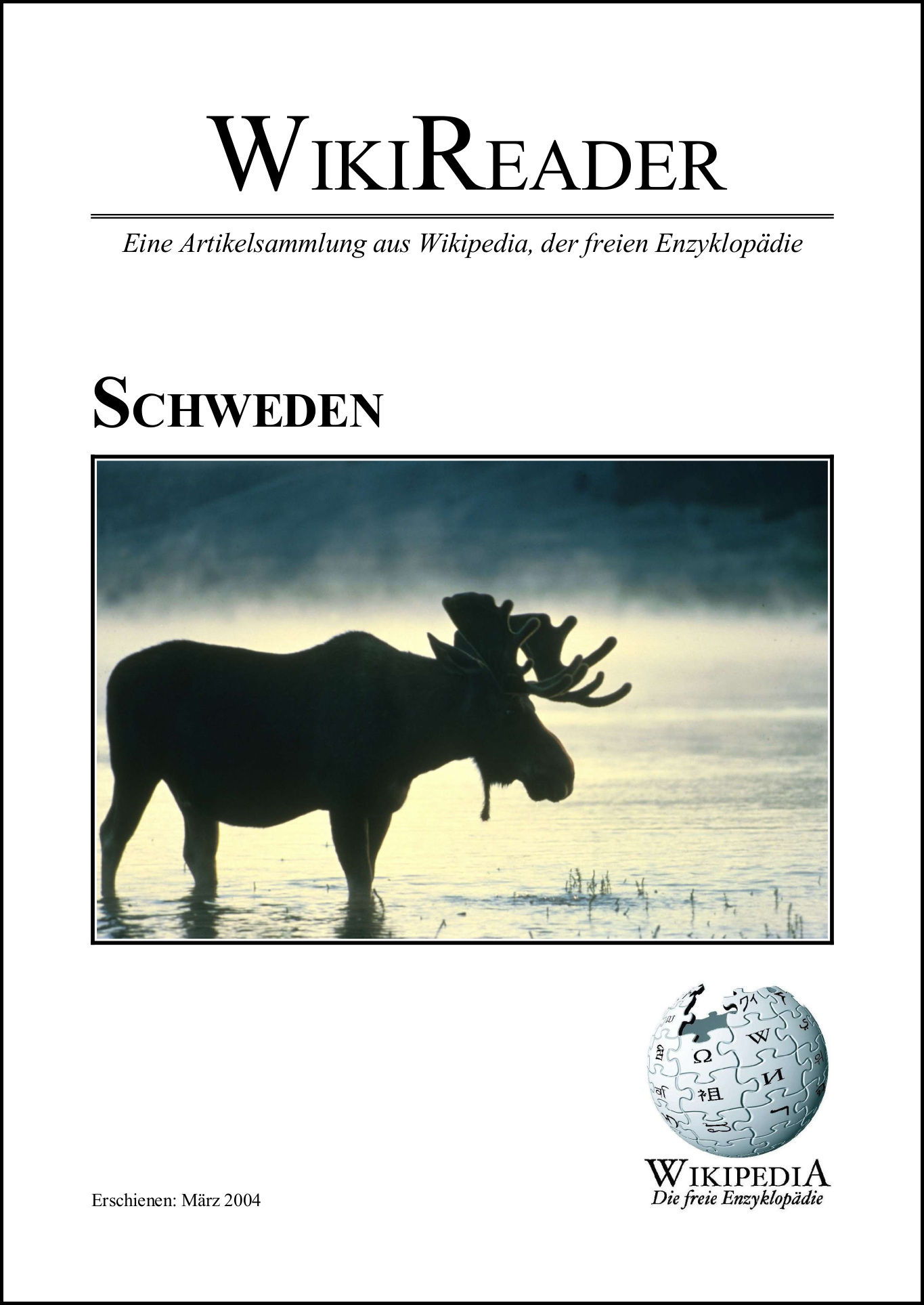 WikiReader Titelbild Schweden